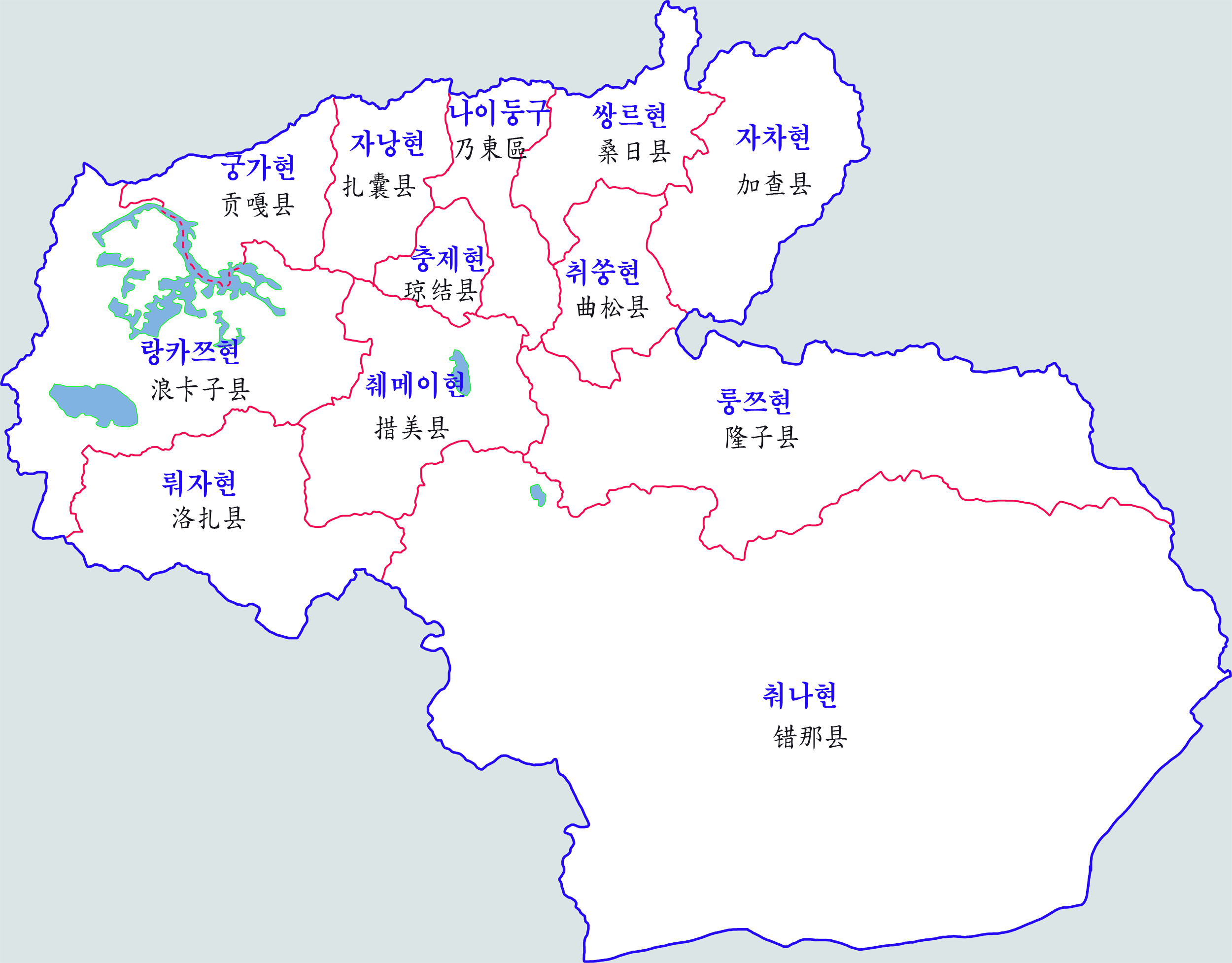 산난시 행정지도